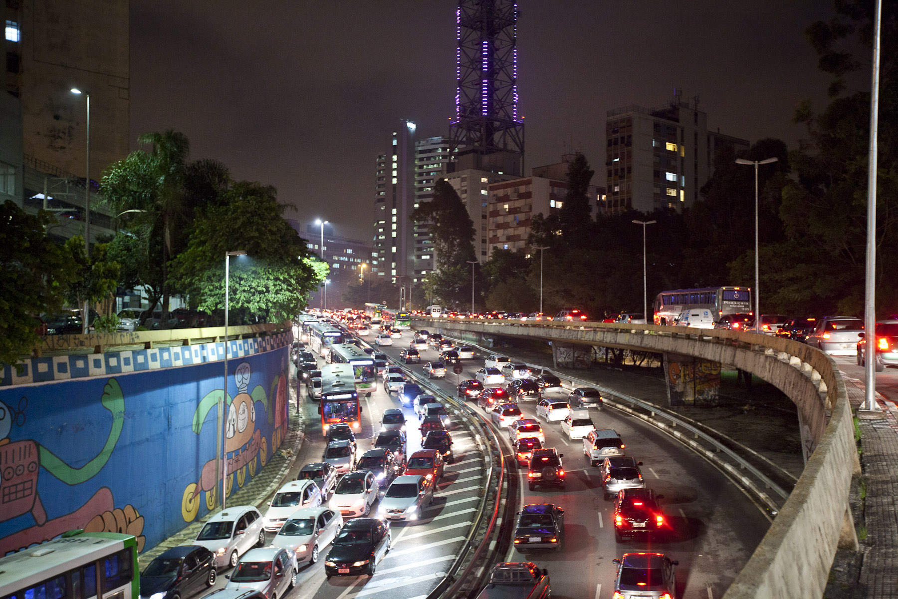 SÃO PAULO, SP, BRASIL, 08-03-2013, 19h20: Tunel de acesso a av Paulista parado apos forte chuva. (Foto: Zé Carlos Barretta/Folhapress FOTO)